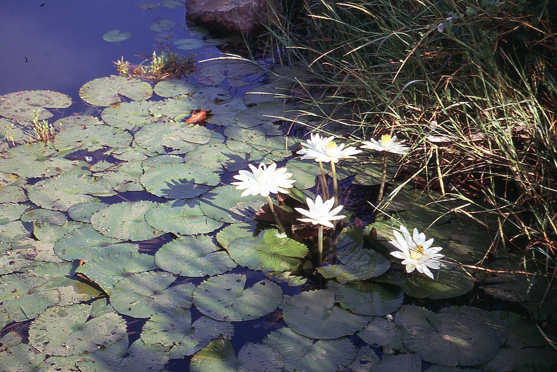 [Nymphaea lotus], Gambia 1990 18